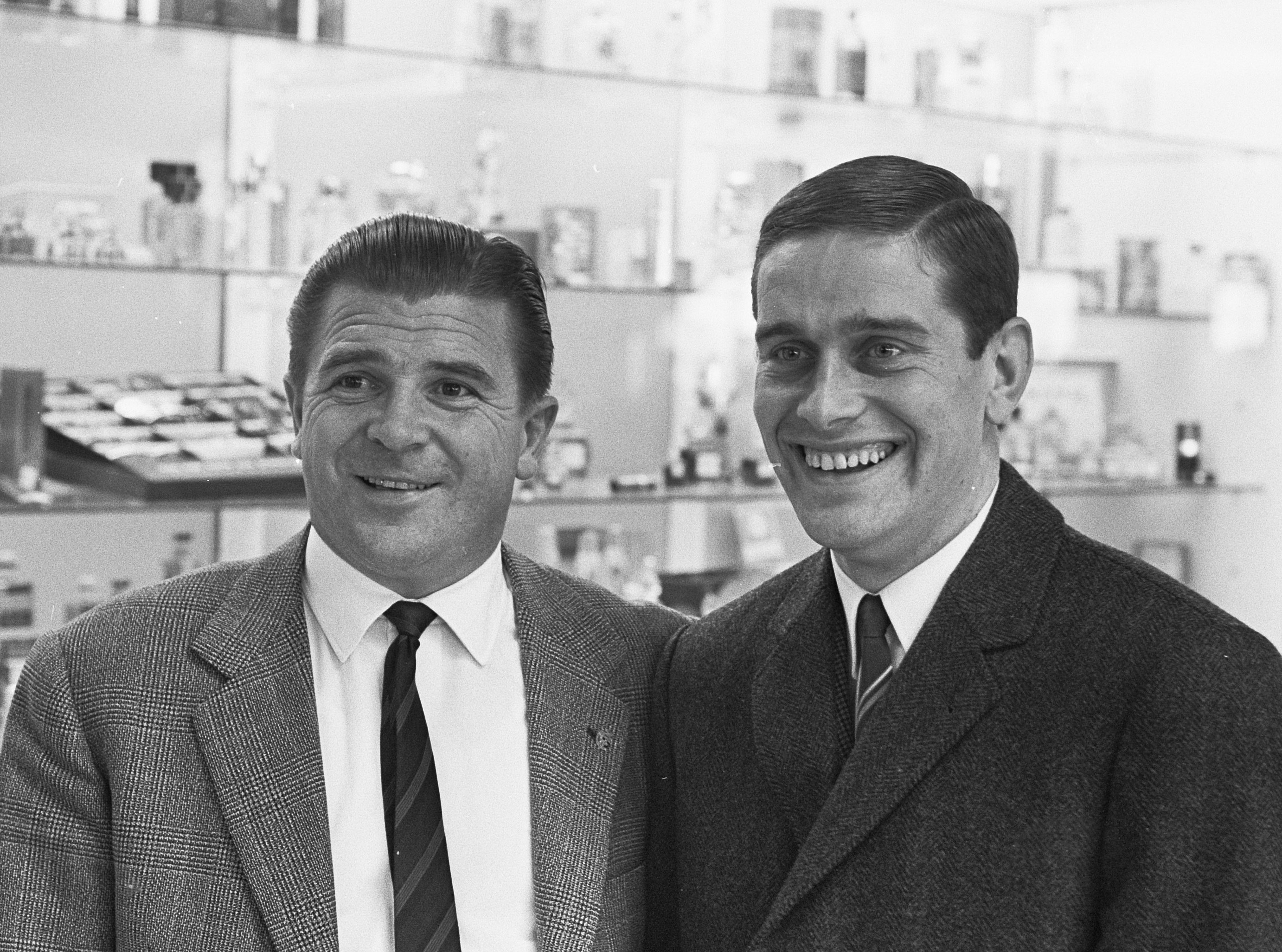 Puskas (links) met Nederlandse voetballer Ger Lagendijk ( naar Vancouver vertrokken)